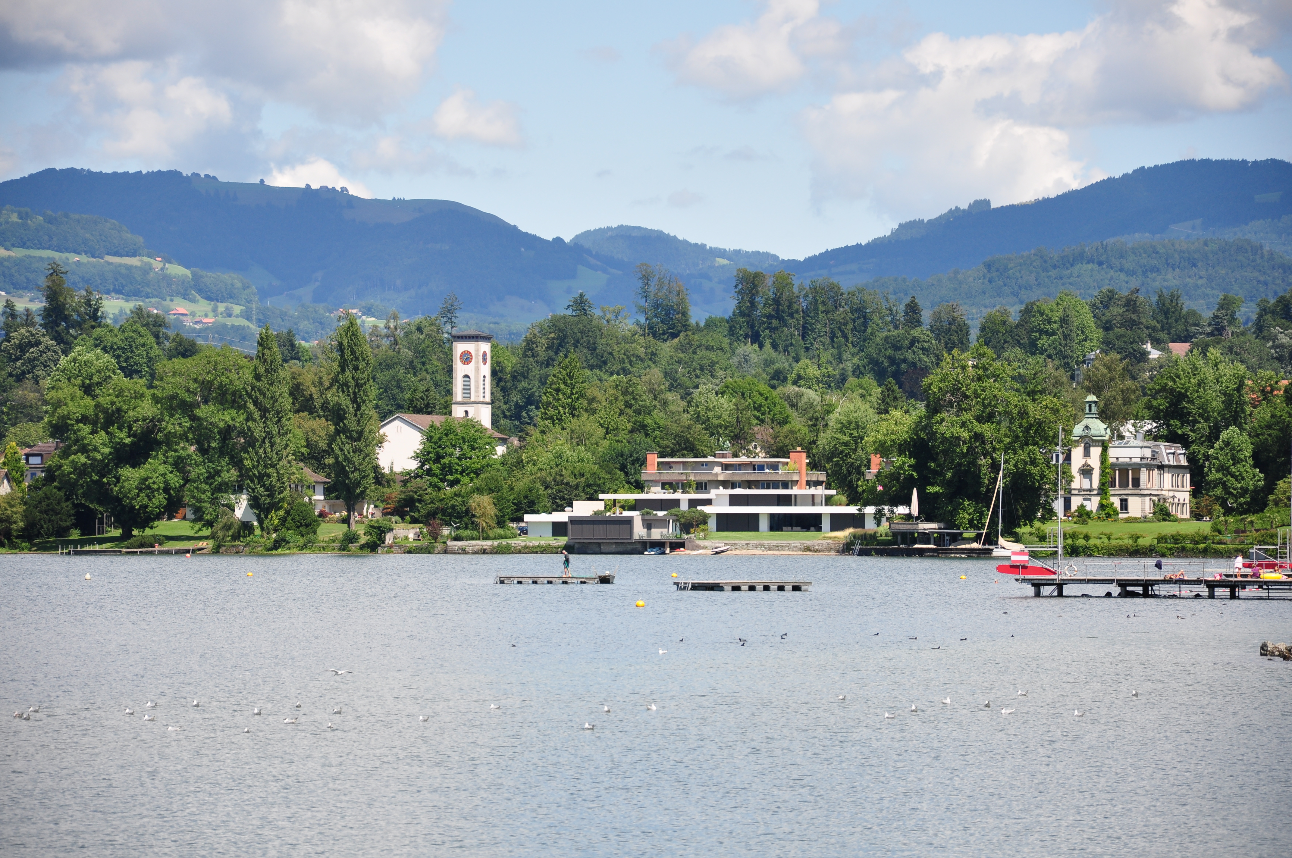 Reformierte Kirche & Kempratner Bucht in Rapperswil (Switzerland)